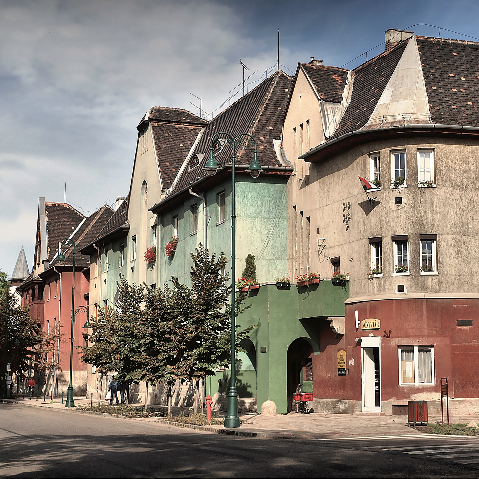 Lakóház (Budapest 19, Kós Károly tér 15.) This is a photo of a monument in Hungary, Identifier: 1267